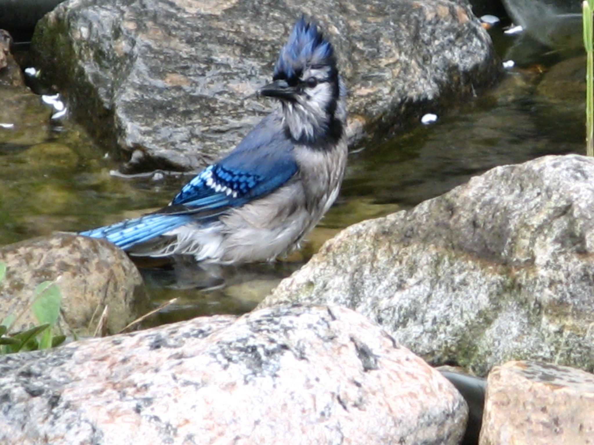 geai bleu mouillé